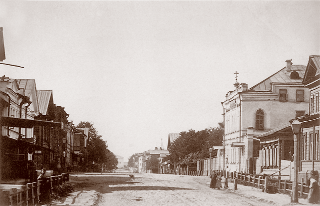 Варварская улица Нижнего Новгорода